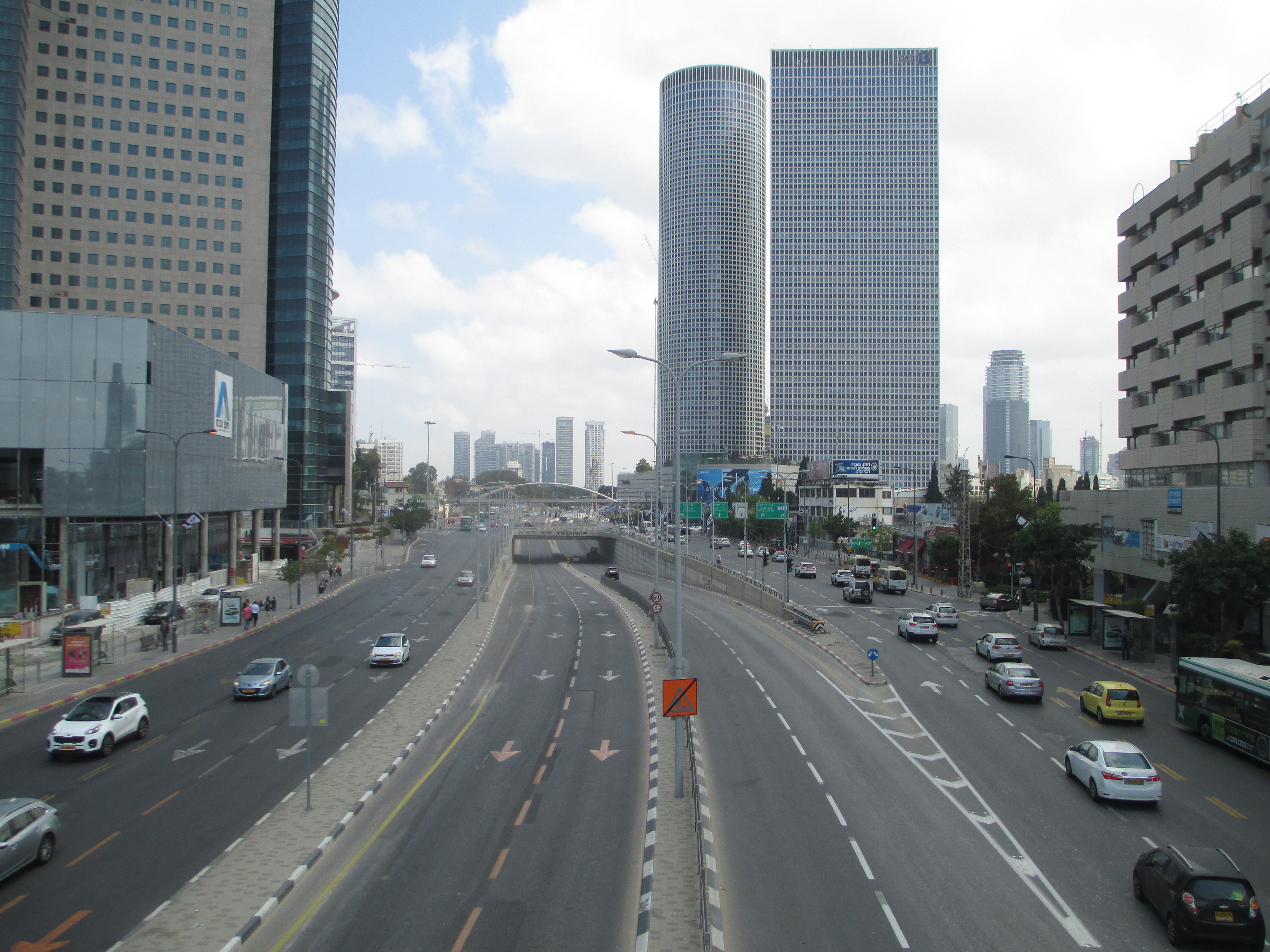 דרך בגין, צילום מגשר קלקא